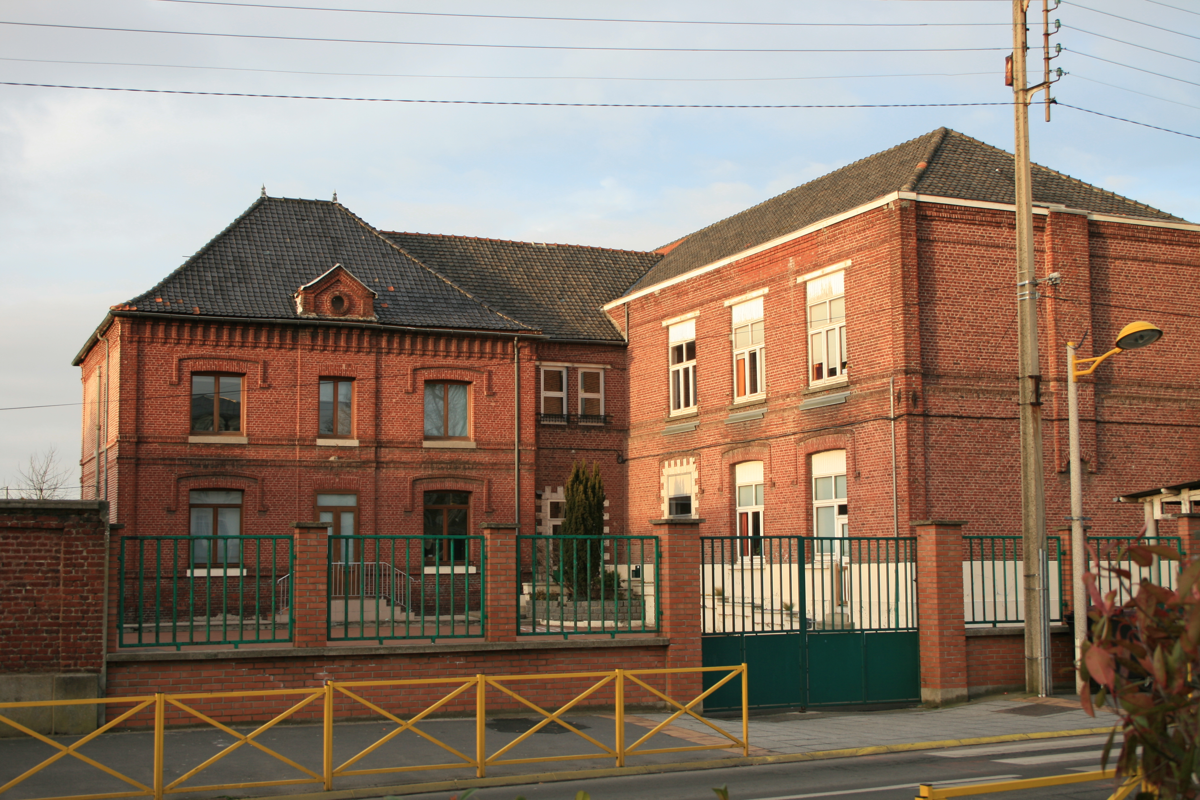 Ecole Pantigny de OIGNIES